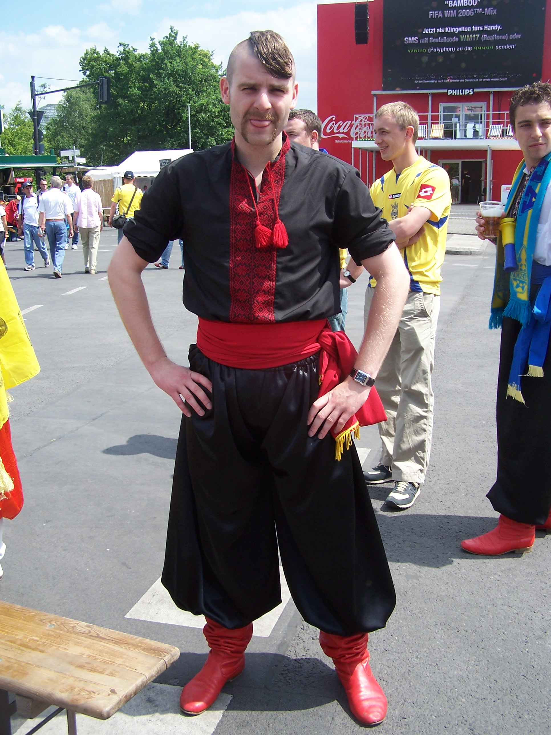 Alex Demianczuk